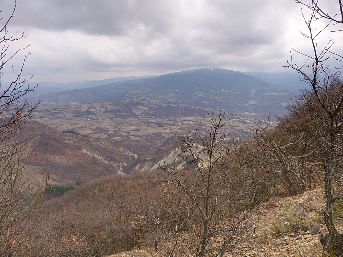 Vista sul Giarolo